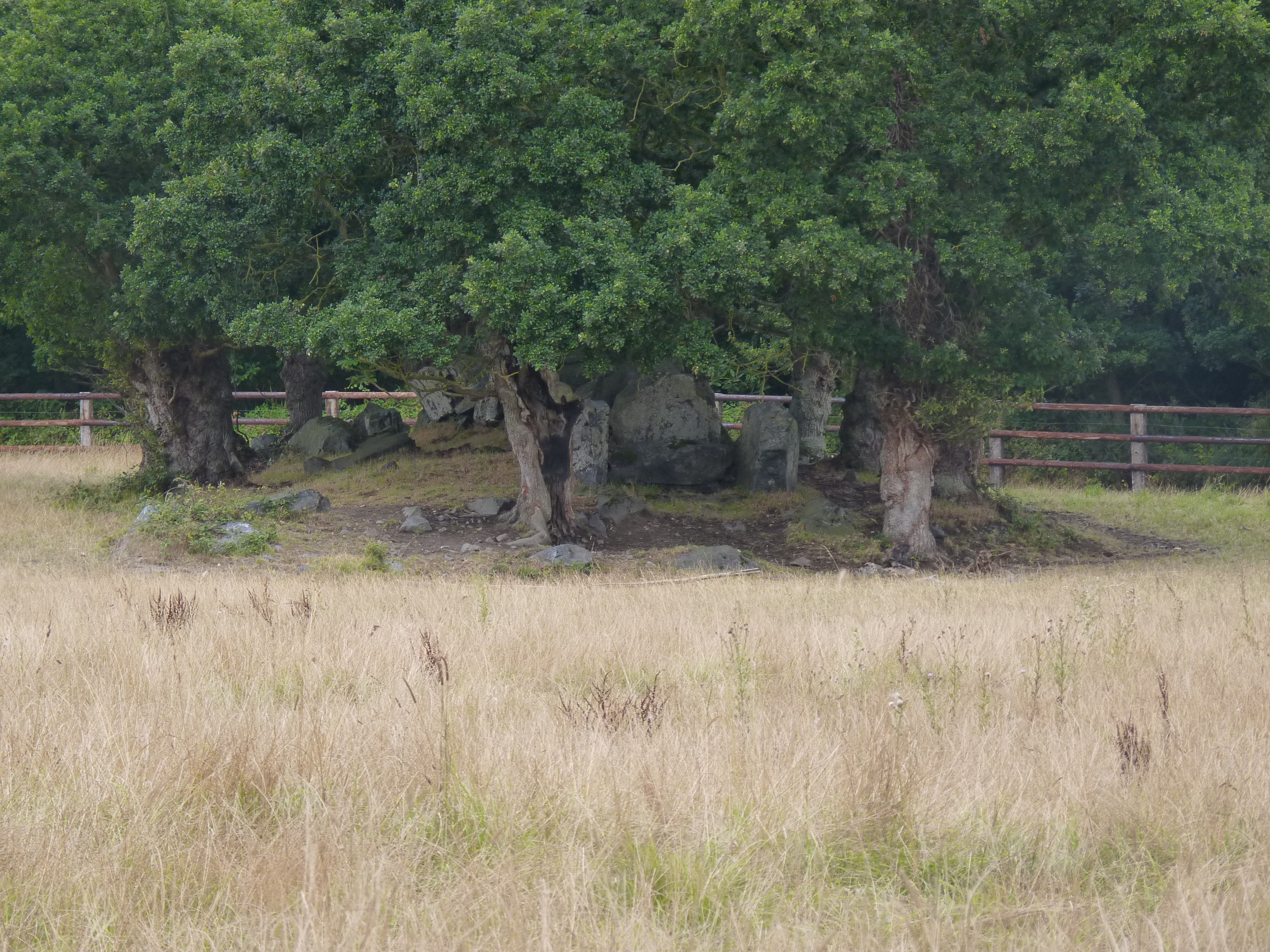 Allée couverte située dans un pré.